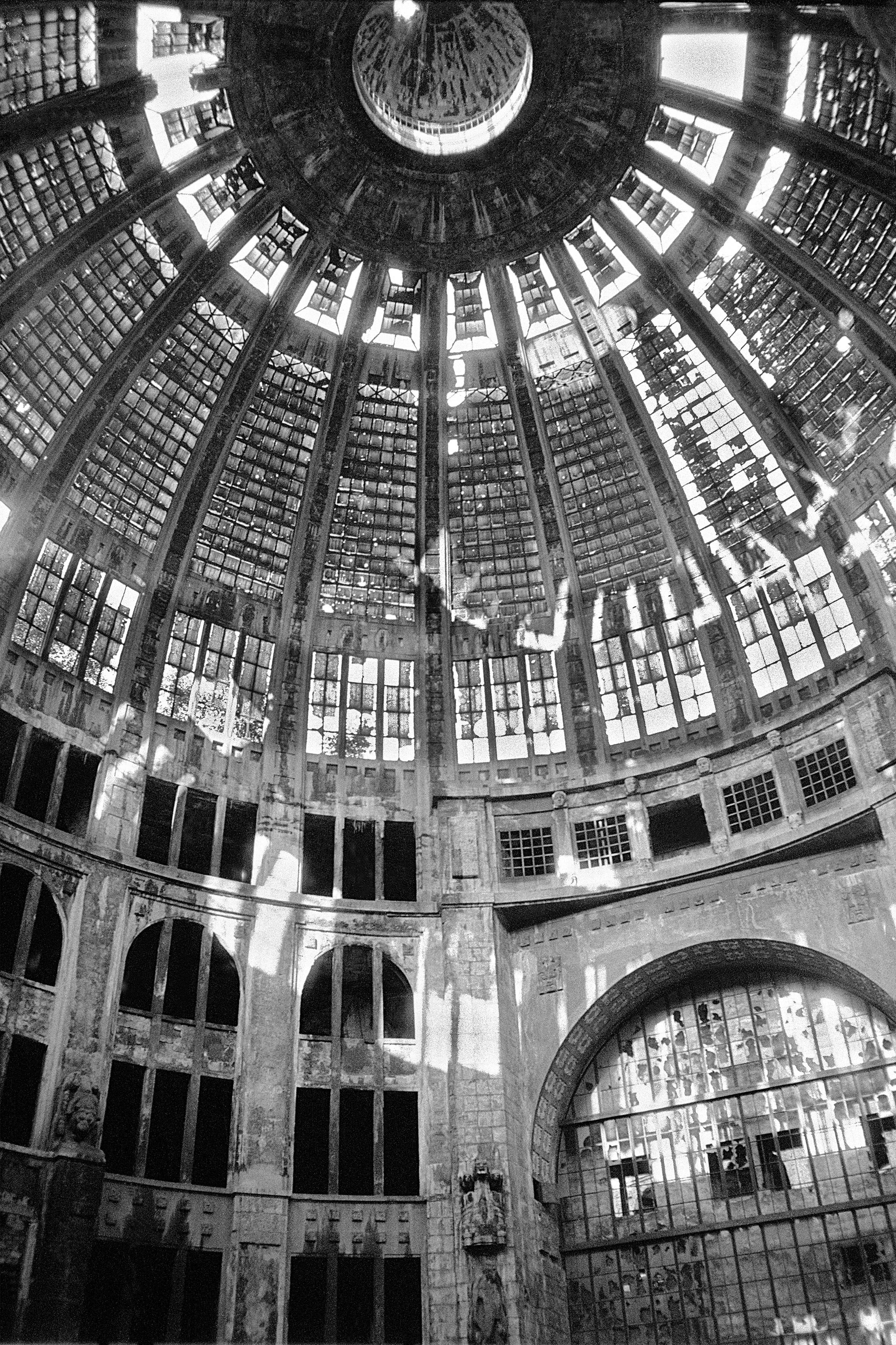 Berlin Haus der Technik AEG Rotunde, weitere Bilder auf : ddr-fotograf.de